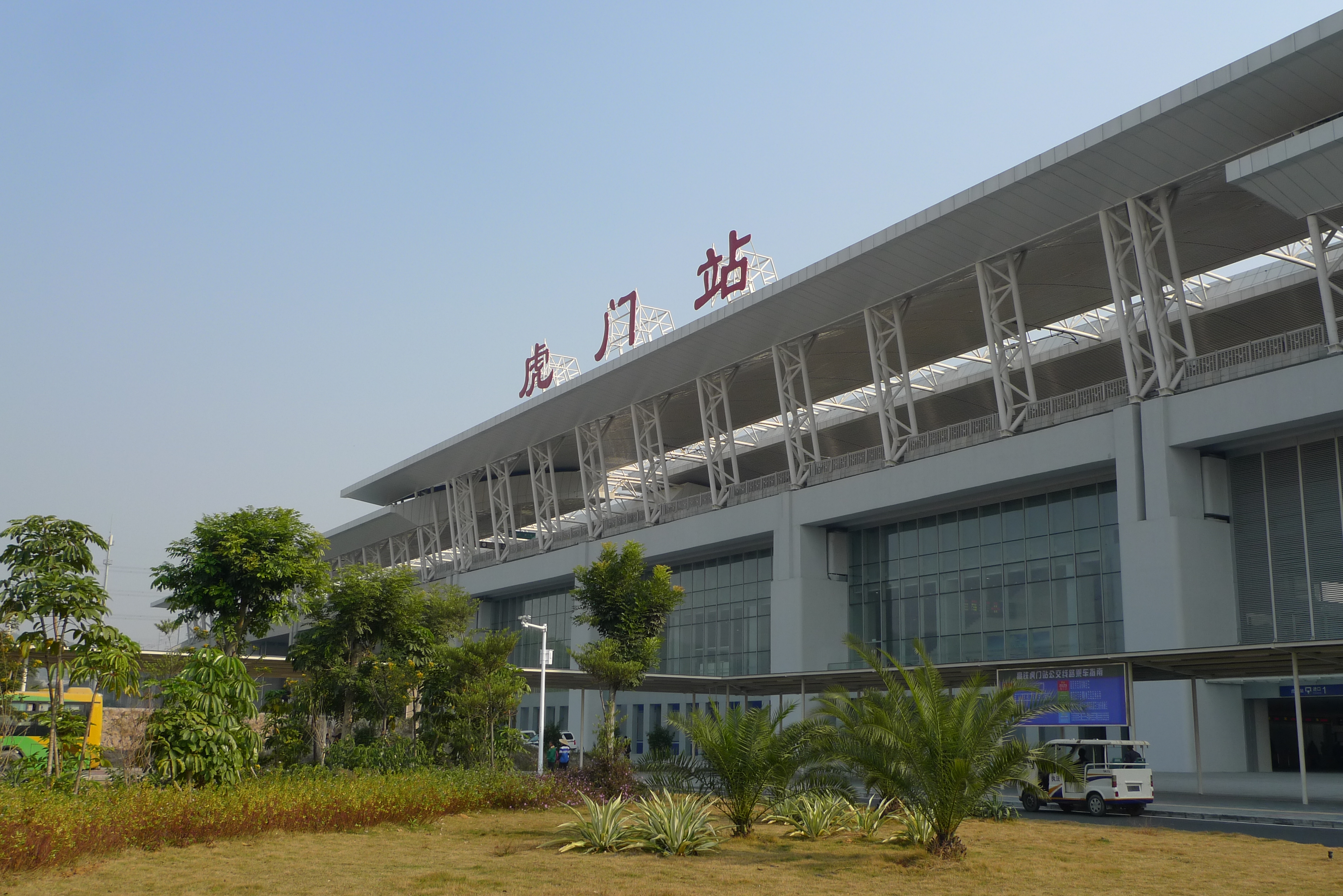 東莞虎門站外觀